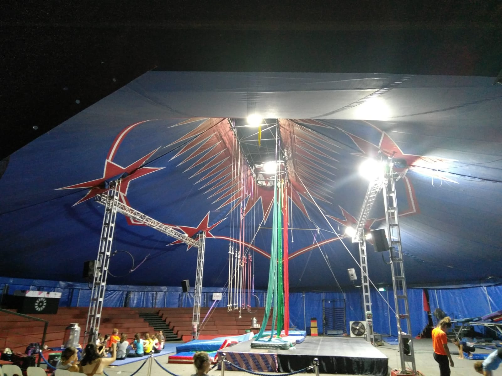 קרקס פלורנטין